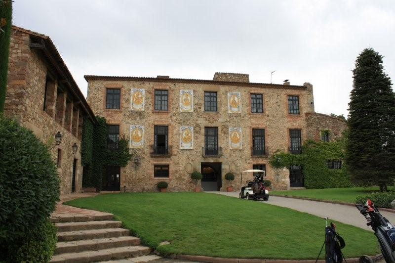 Fotografia de Torre Tabernera, Vallromanes.